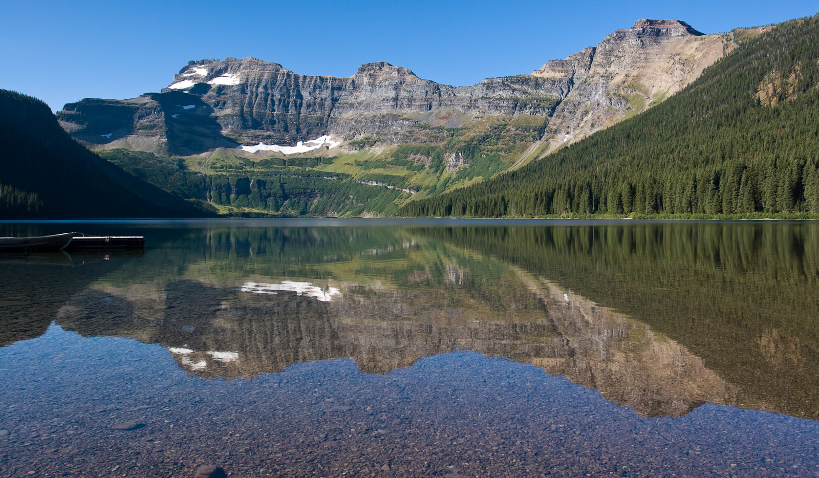 Cameron Lake